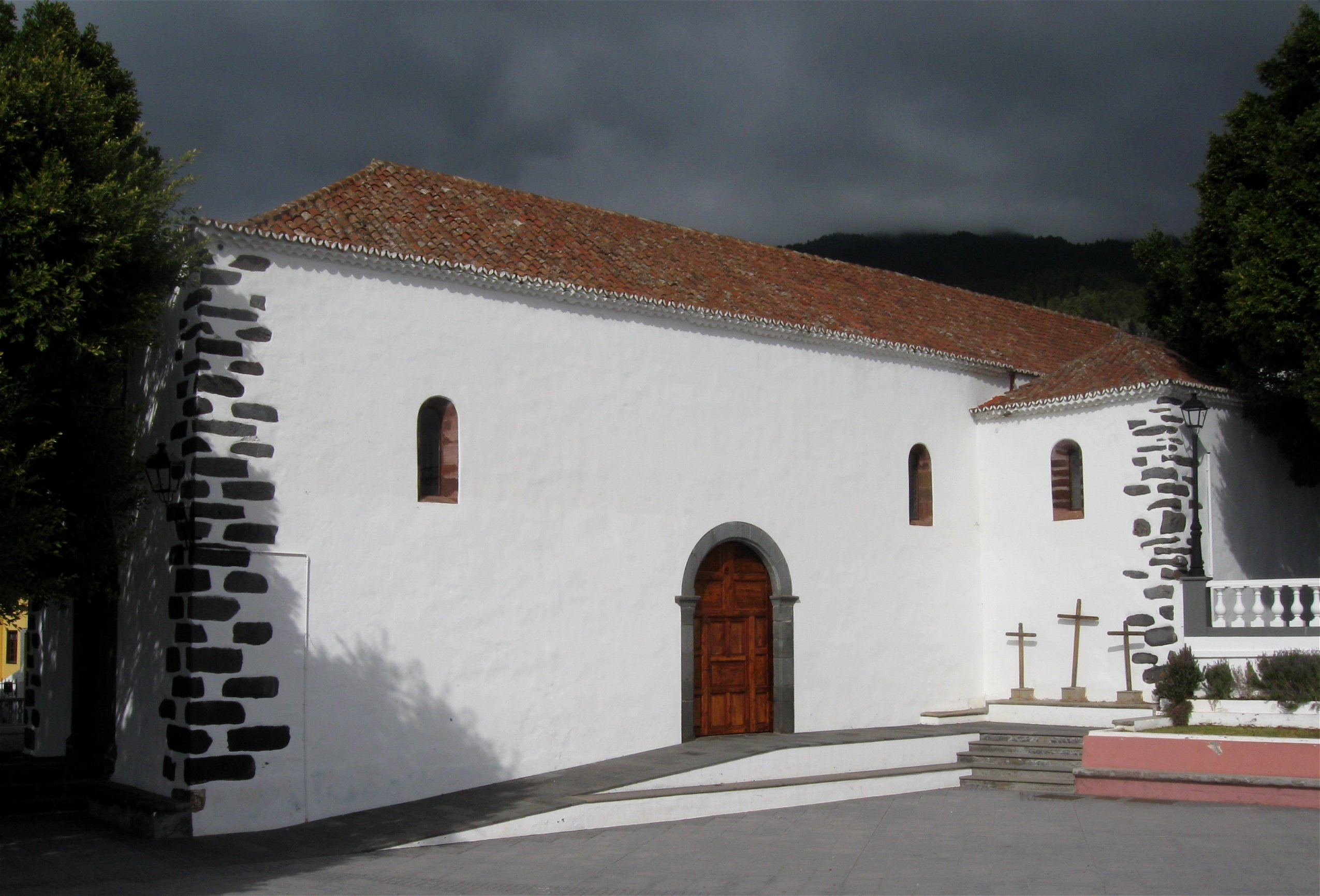 Iglesia Nuestra Senora de la Candelaria, Tijarafe, La Palma